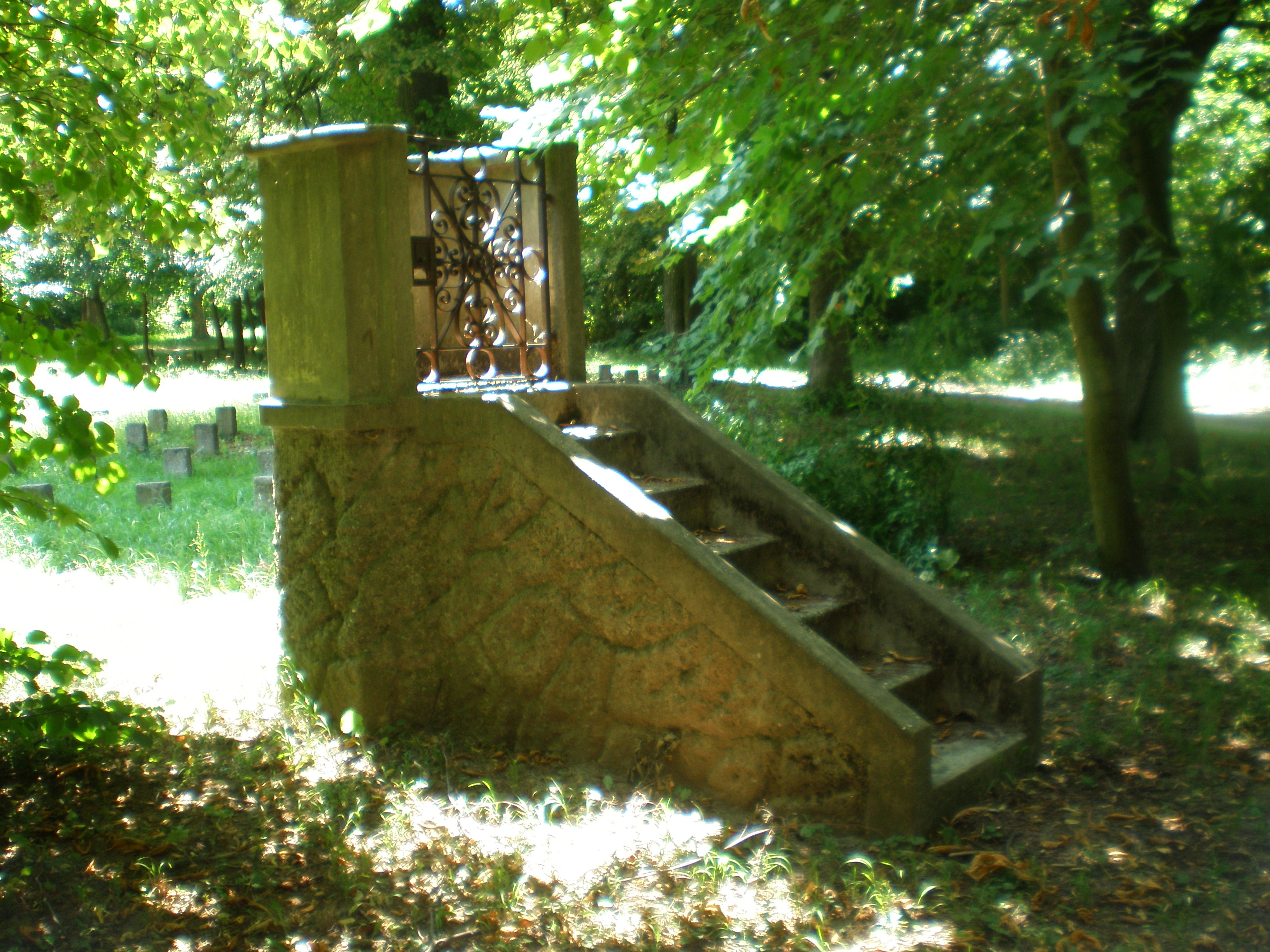 Szószék a Sarlós Boldogasszony-kegykápolna mellett Máriakálnokon (Győr-Moson-Sopron megye, Magyarország)